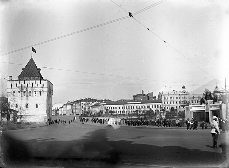 Советская площадь. Город Горький